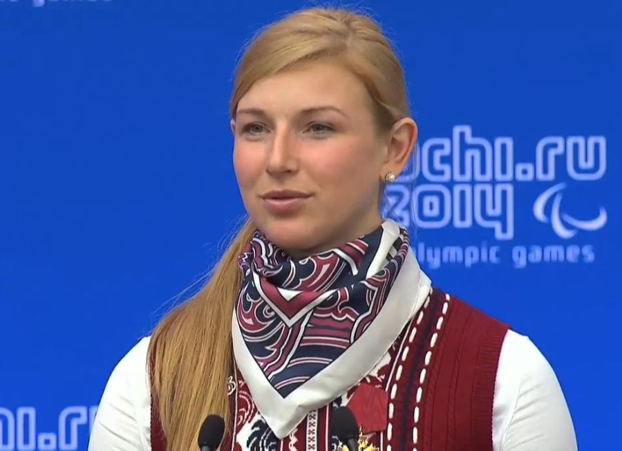 Трёхкратная паралимпийская чемпионка, серебряный и бронзовый призёр Паралимпийских игр в биатлоне и лыжных гонках Алёна Кауфман.